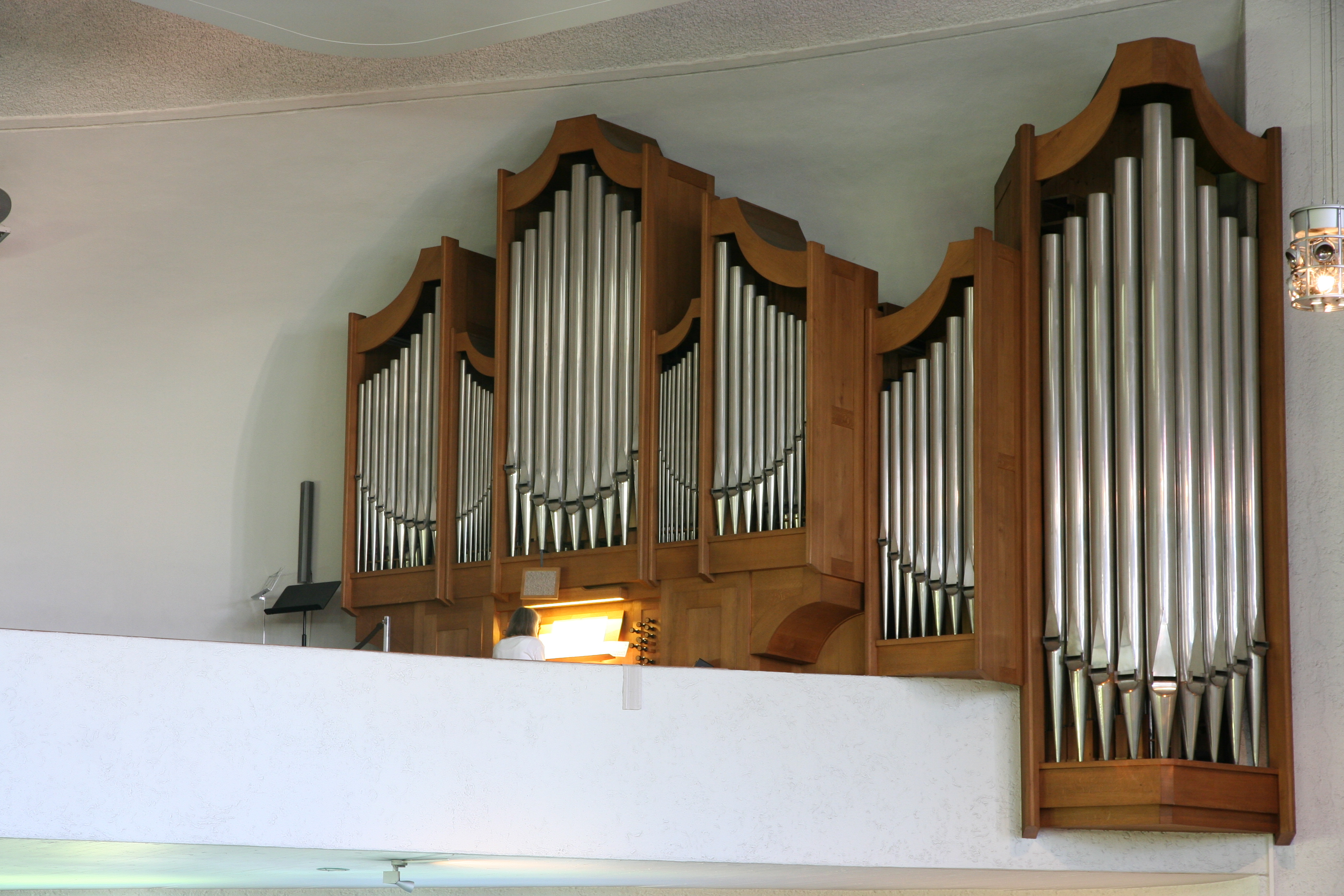 Römisch-katholische Pfarrkirche St. Josef Schlieren